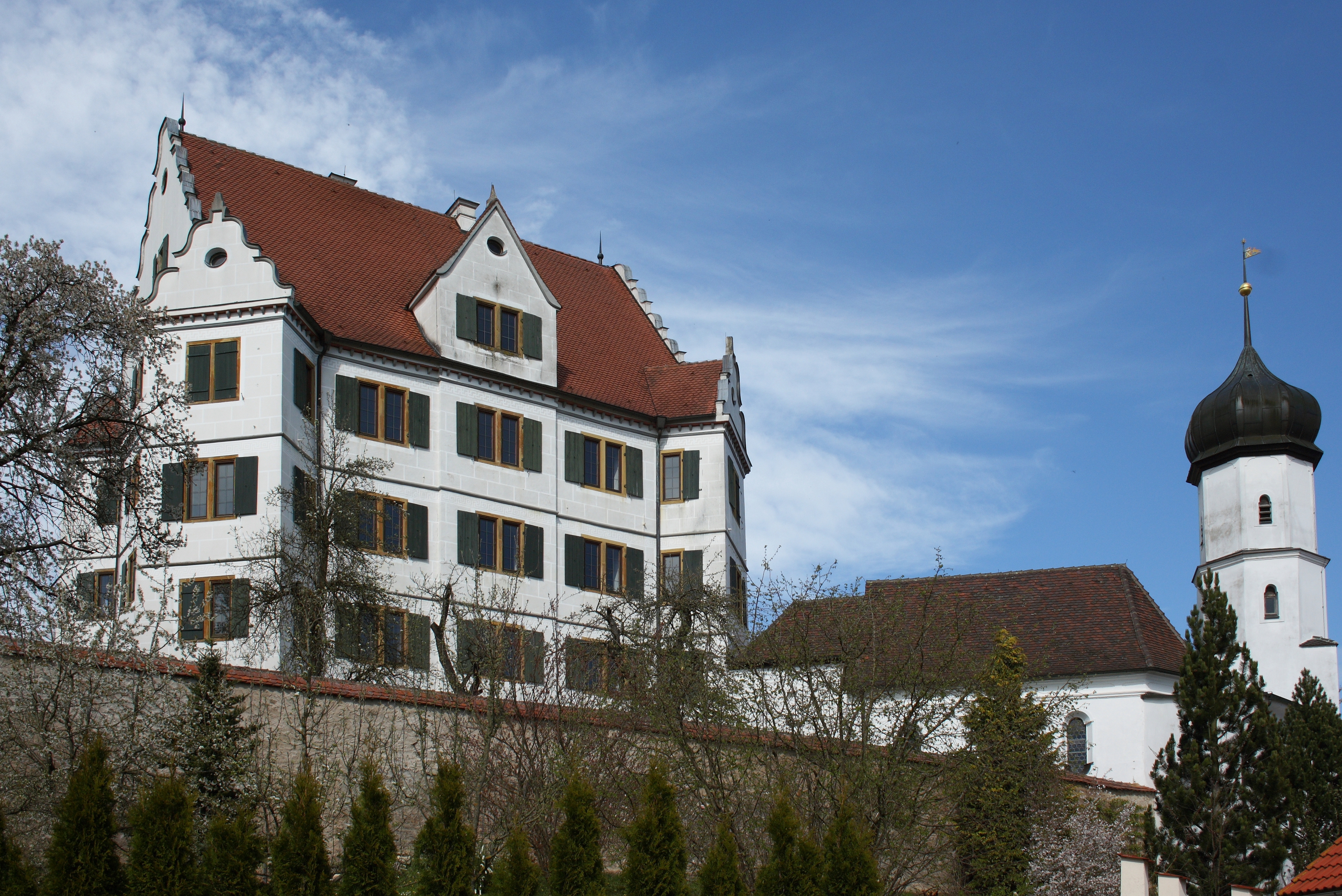 Schloss Hirschbrunn, ehemaliges Jagdschloss in Dornstadt, einem Ortsteil von Auhausen im Landkreis Donau-Ries (Bayern), Hirschbrunner Straße 20, erbaut 1626; mit katholischer Schlosskapelle St. Maria, erbaut 1692